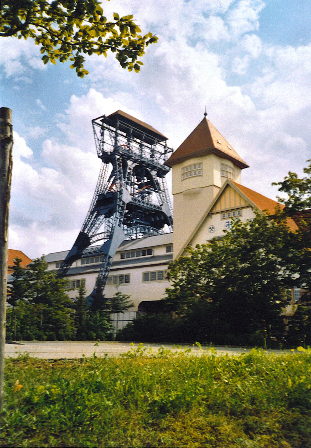 "Am Petersenschacht" - Bergbaumuseum in Sondershausen (Nordthüringen), Seitenansicht